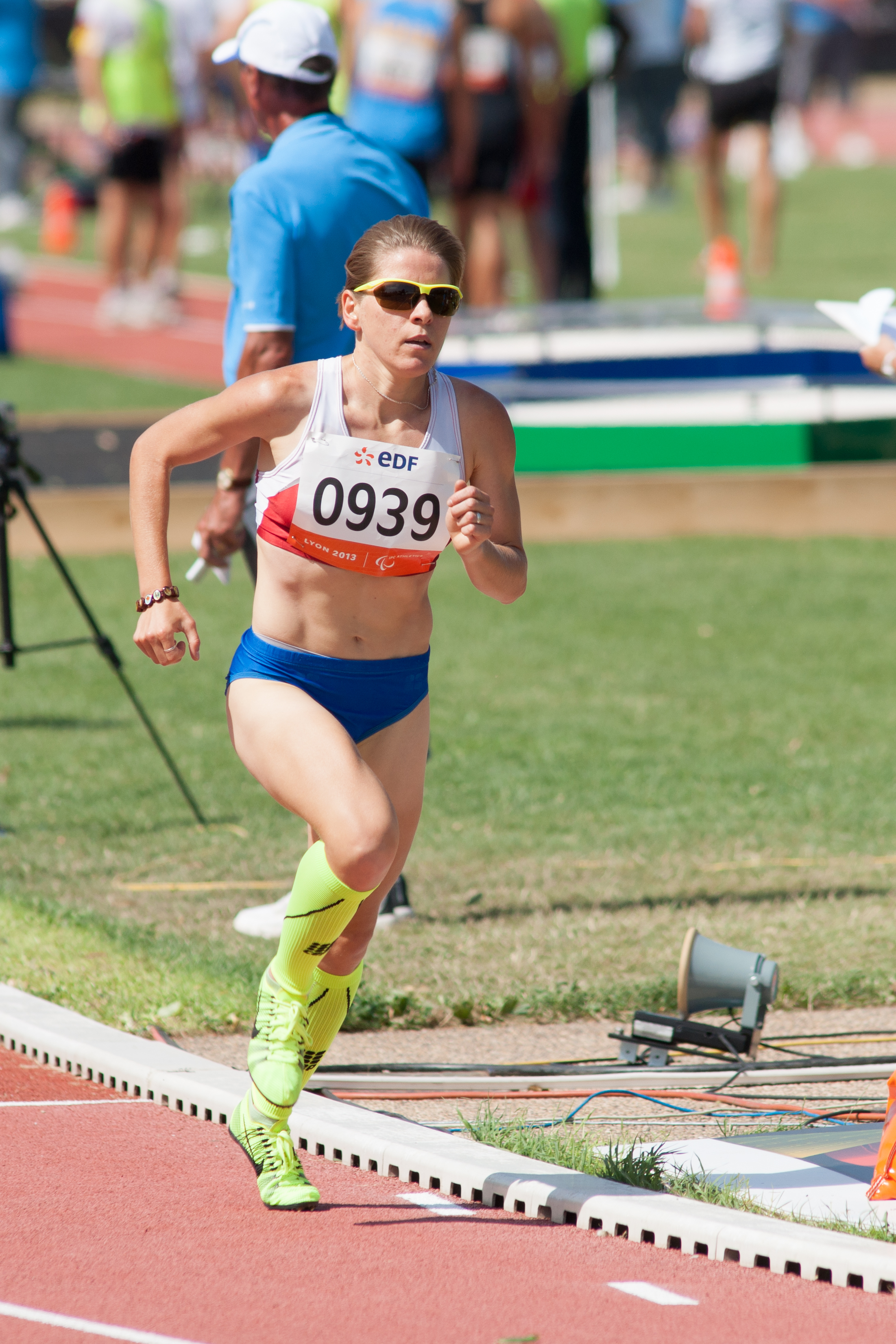 Championnats du monde d'athlétisme IPC 2013. 1500 mètres féminin T12.